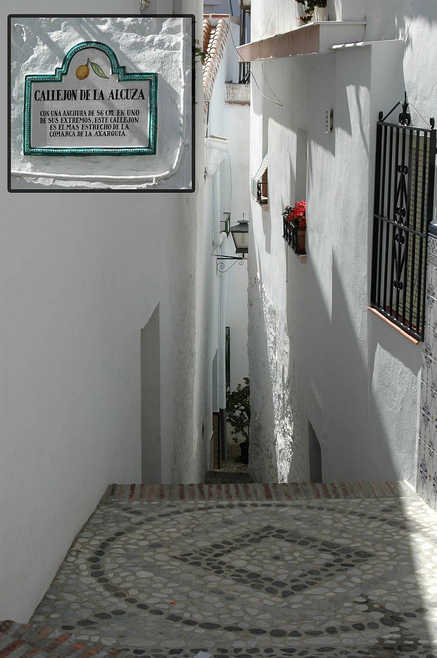 Vista desde la parte mas ancha del callejón.